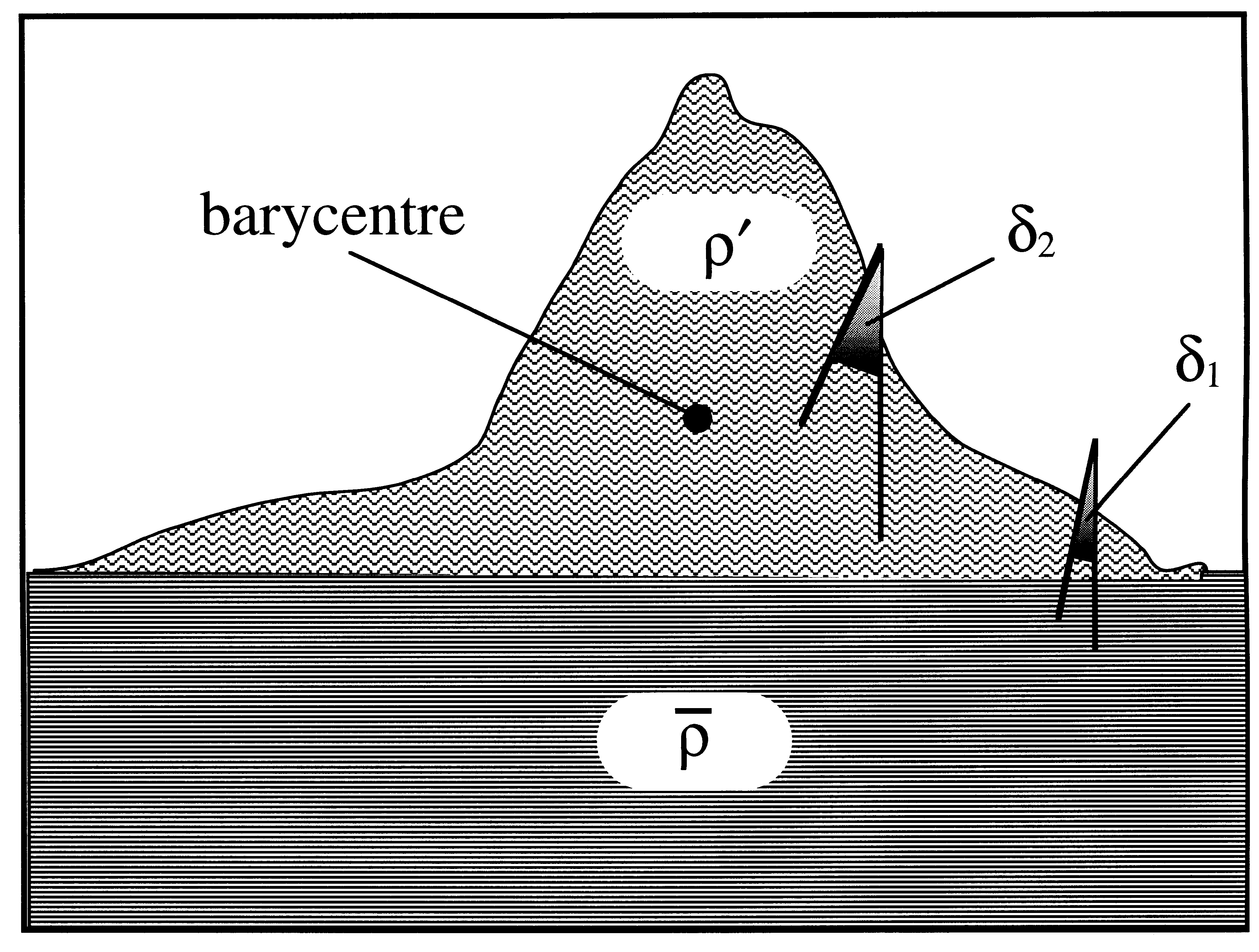 Schéma de la déviation produite par une montagne sur la direction d'un fil à plomb. Le schéma est l'œuvre de l'auteur de l'article Masse de la Terre, qui la met dans le domaine public. Utilisateur:Carlo_denis